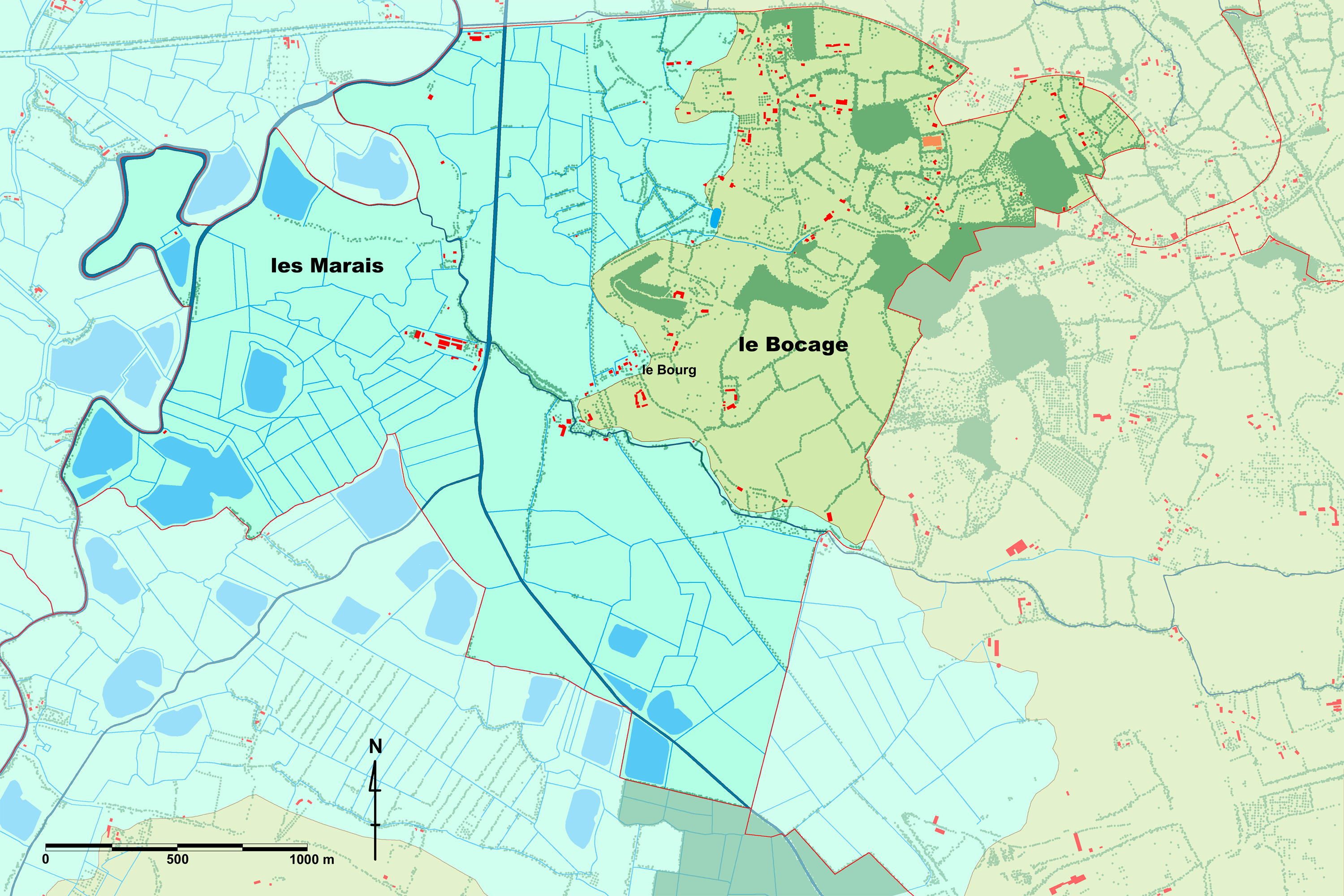 répartition des canaux de drainage dans les marais et des haies dans le bocage. En bleu : les canaux de drainage et les gabions - en vert : les haies bocagères et les bois